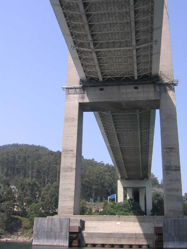 Vista del Puente de Rande, Pontevedra, Galicia, España. Vista del tablero por su parte inferior.